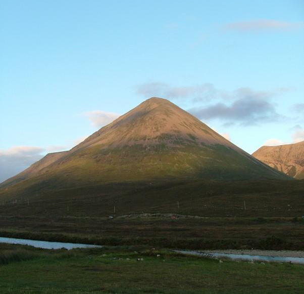 Glamaig from Sligachan